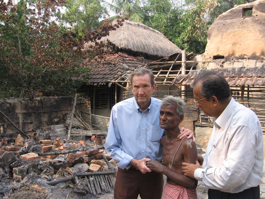 Description: Ramsey Clark, the former Attorney General of the United States visited Nandigram in November 2007 and expressed his solidarity to the poor peasants of the area who were tortured by the CPI(M). Source: Self-uploaded Date: November 29, 2007 Author: Sekharlk সূত্র